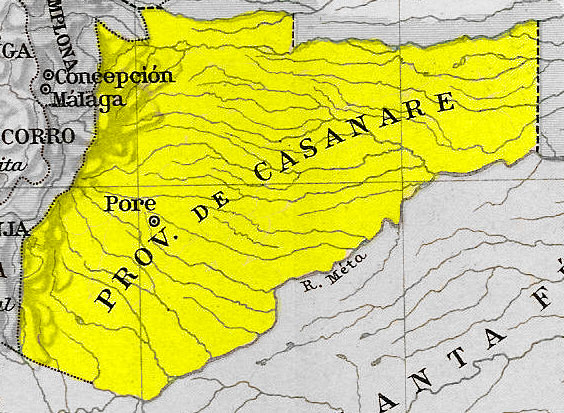 Mapa de la Provincia de Casanare en 1810 y 1830